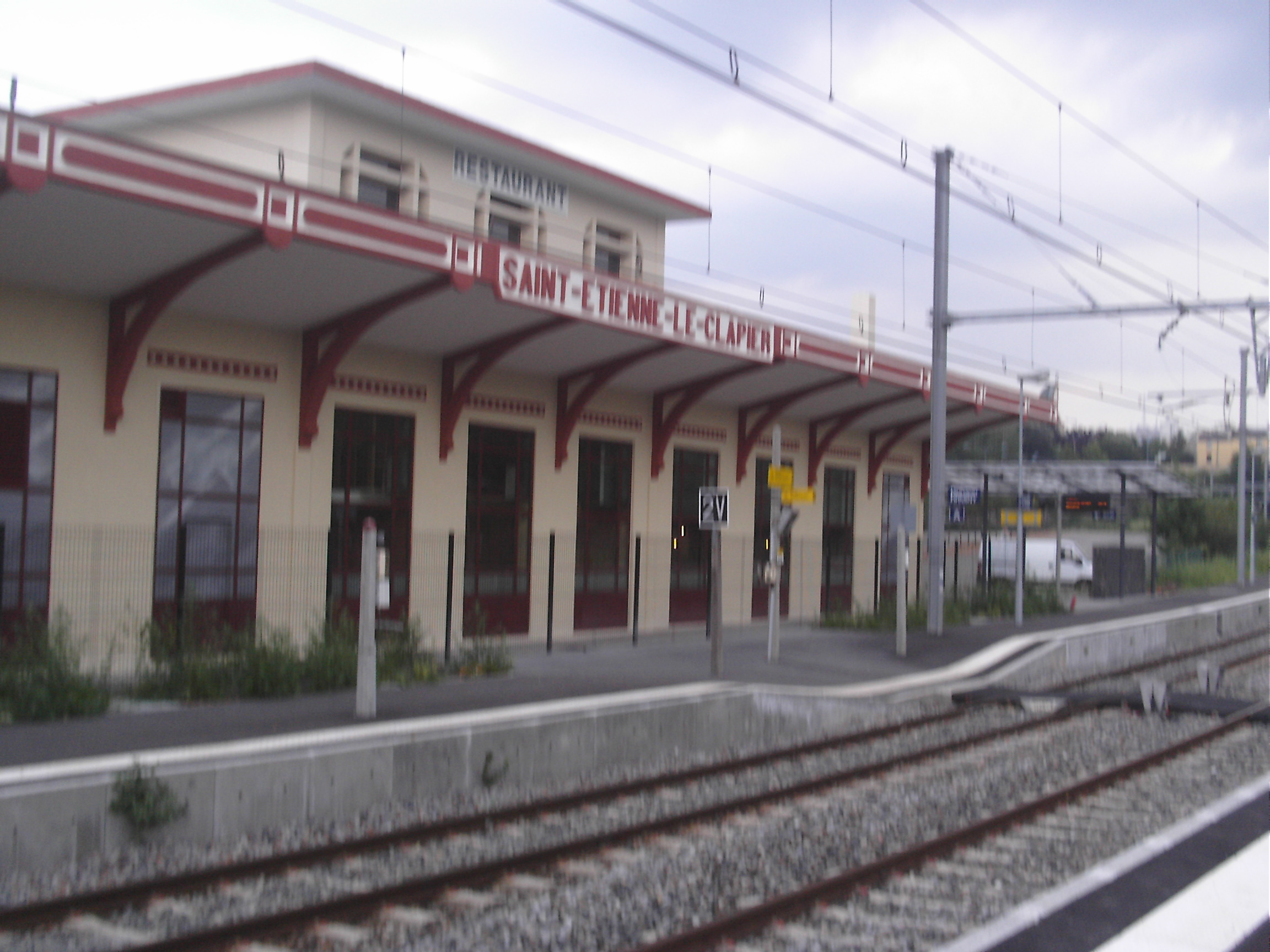 Gare de Saint-Etienne le Clapier